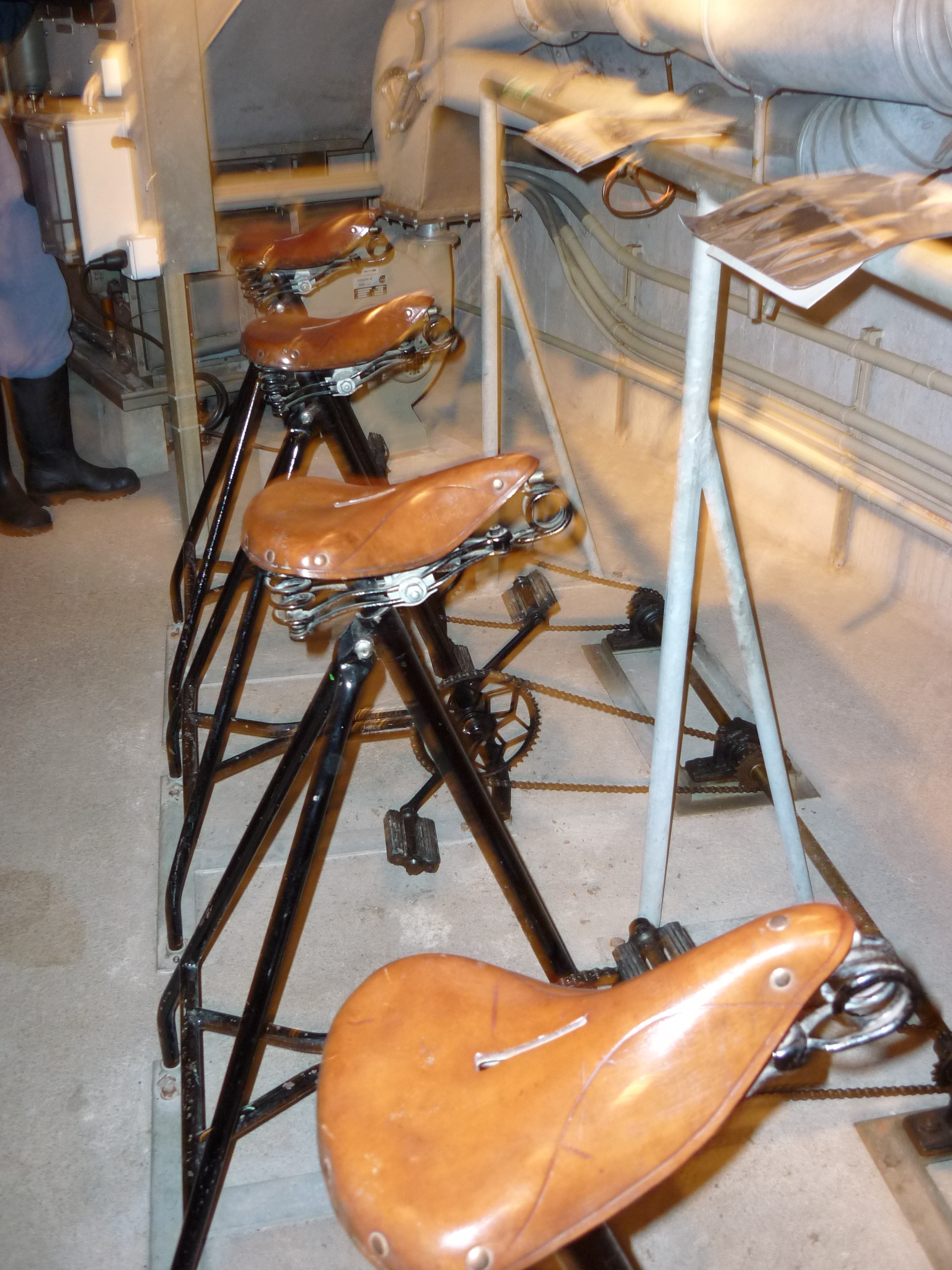 Notstromanlage, Zivilschutzmuseum, Zürich, Schweiz